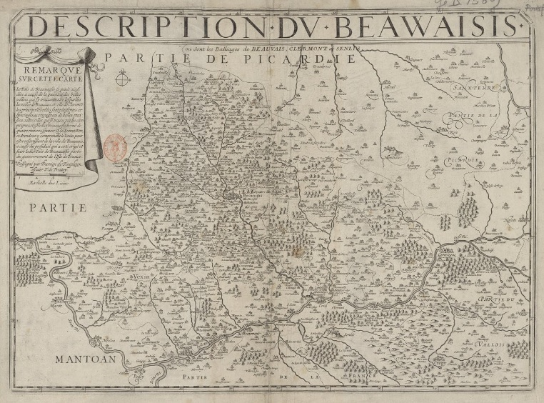 Description du Beauvaisis où sont les Bailliages de Beauvais, Clermont et Senlis. Remarques sur cette carte. Le Pais de Beauvaisis se peult ainsi dire à cause de la quantité del belles vallées... / Dessigné par Damien de Templeux, escuyer Sr. de Frestoy Auteur : Templeux, Damien de (15..-1620). Date d'édition : 1640 Source : Bibliothèque nationale de France, département Cartes et plans, GE D-15609